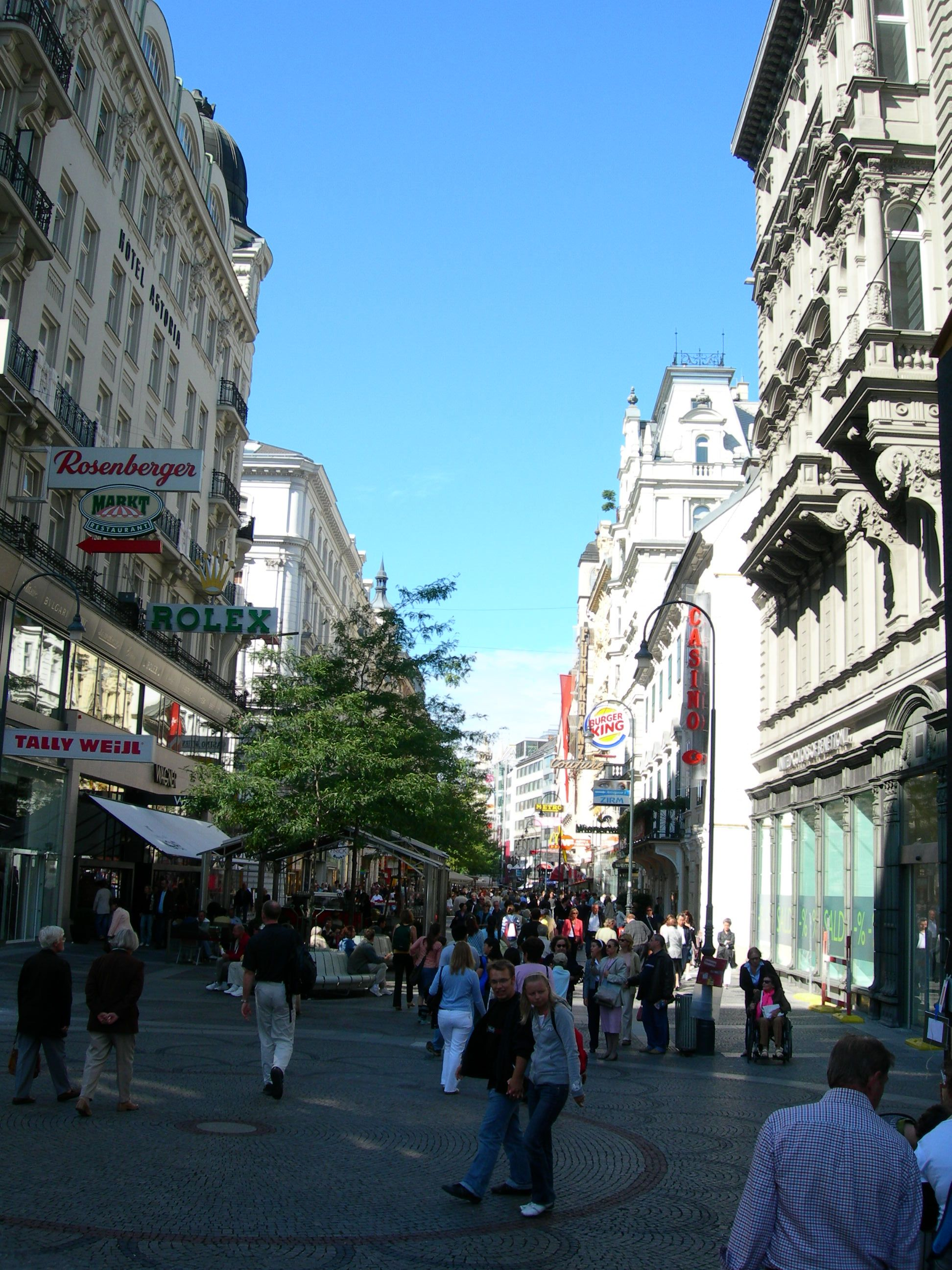 Kärntner Straße in Vienna